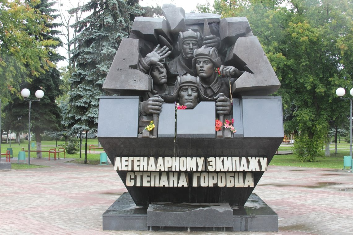 Установлен в Твери в 2011 году. Скульптор Е.А.Антонов.